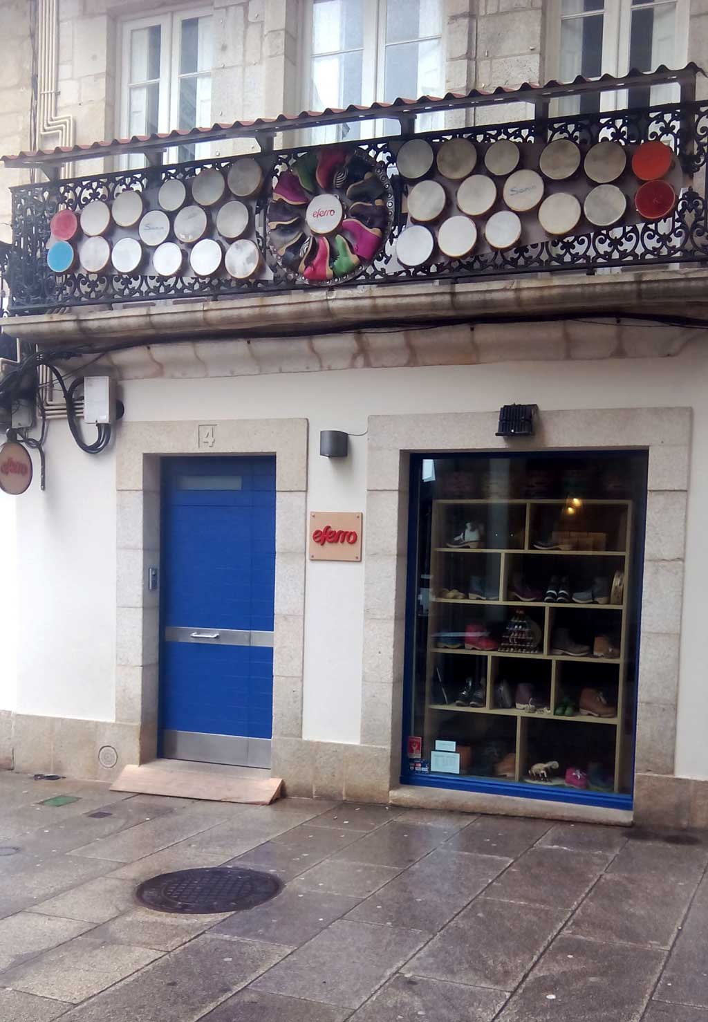 Franquía eferro, rego de auga A Coruña.